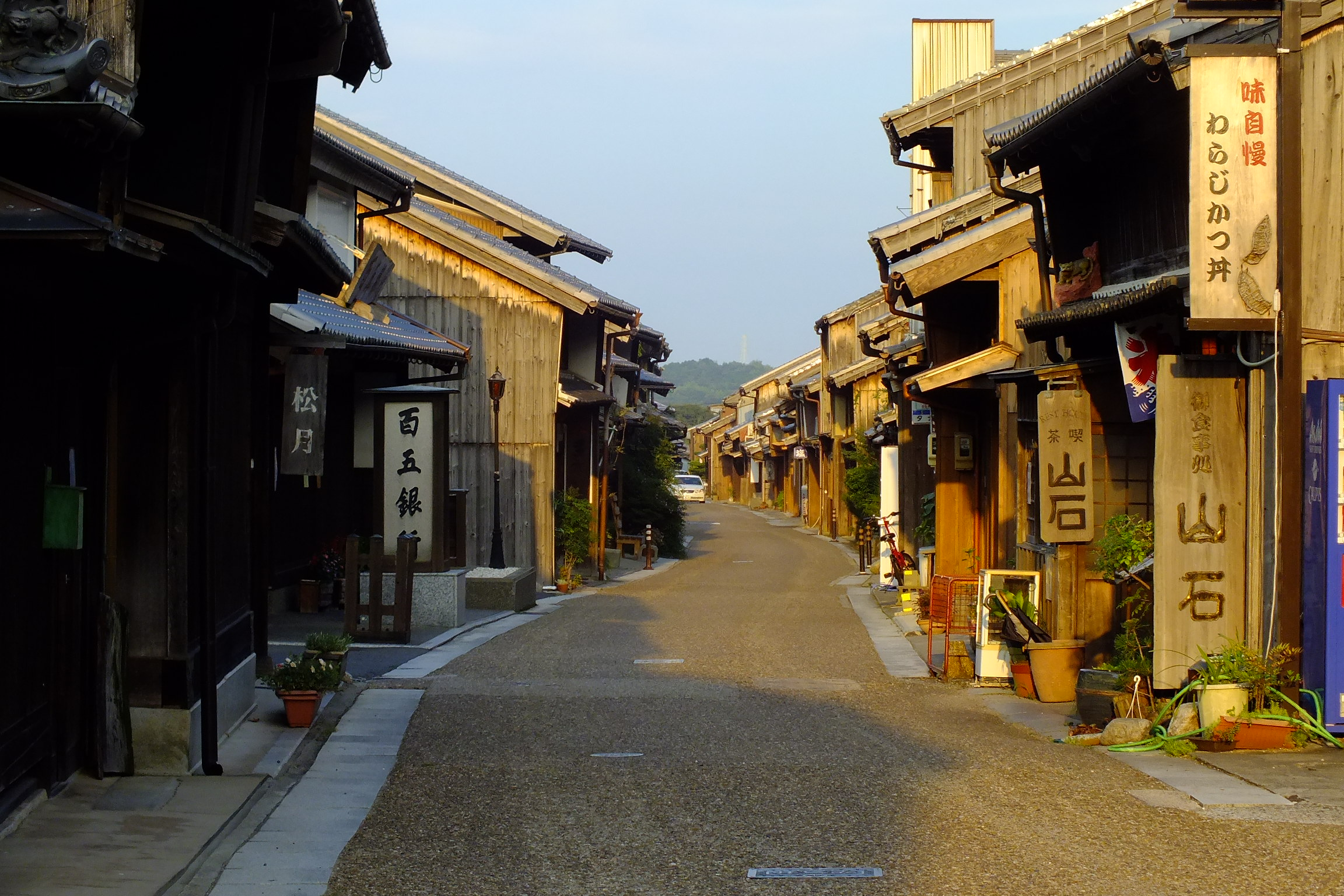 2016-08-05 Tokaido Seki Juku Kameyama City Mie,東海道五十三次 関宿